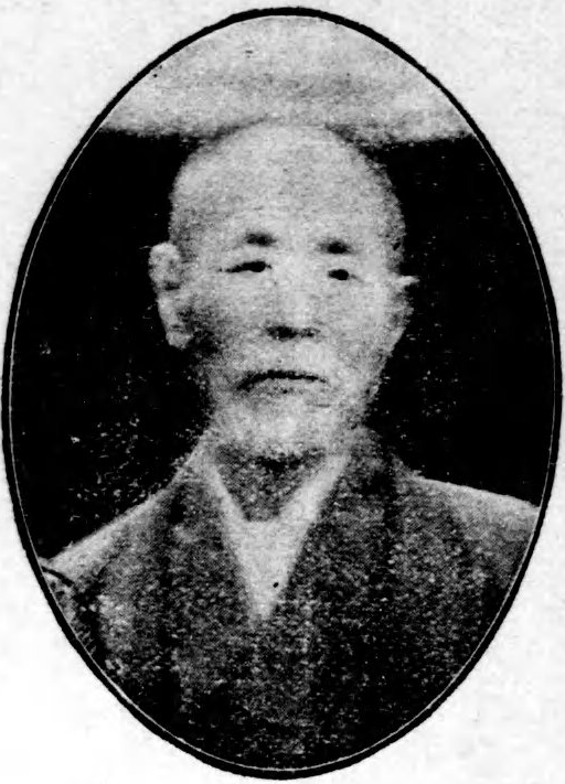 村上 専精